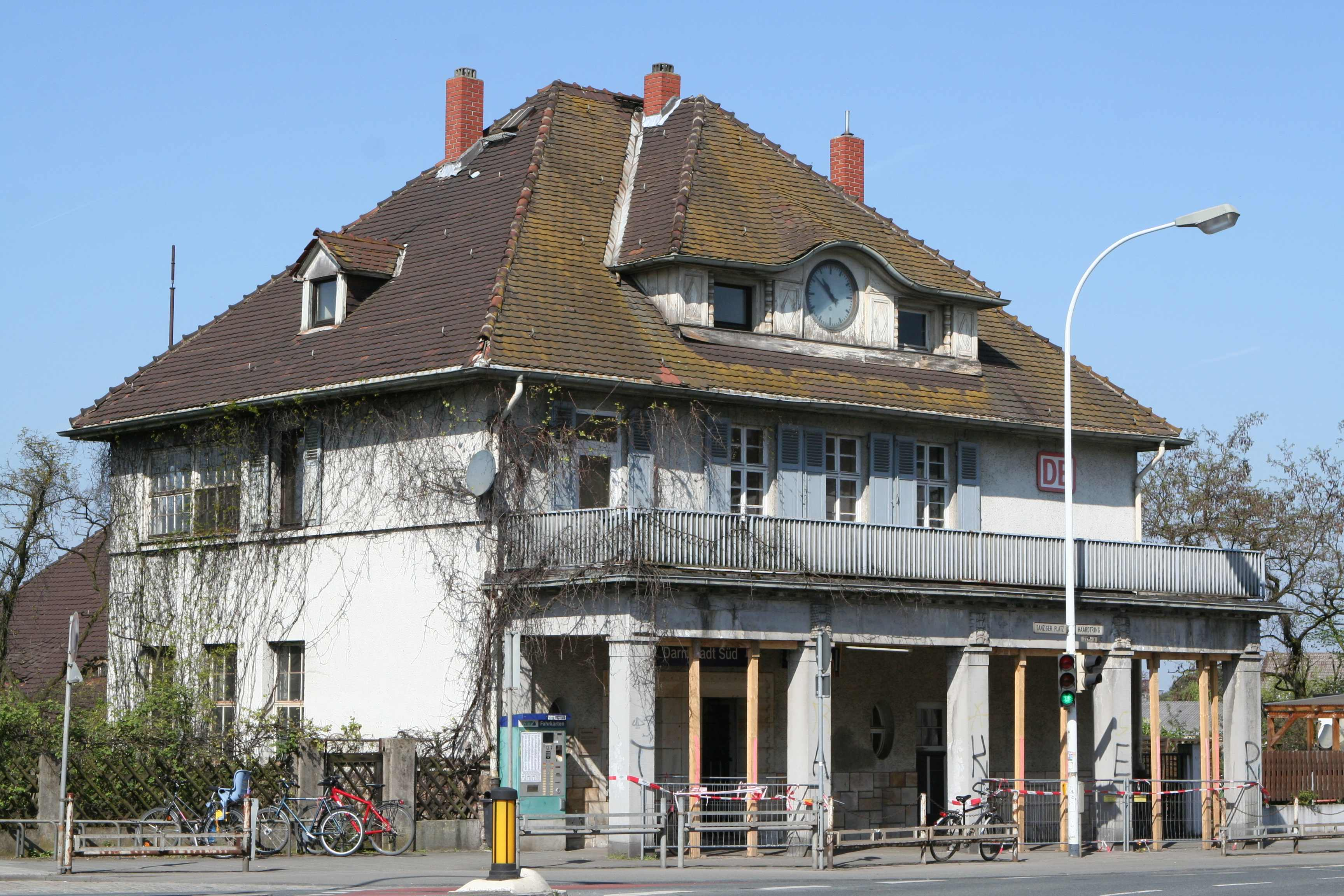 Empfangsgebäude Bahnhof Darmstadt Süd